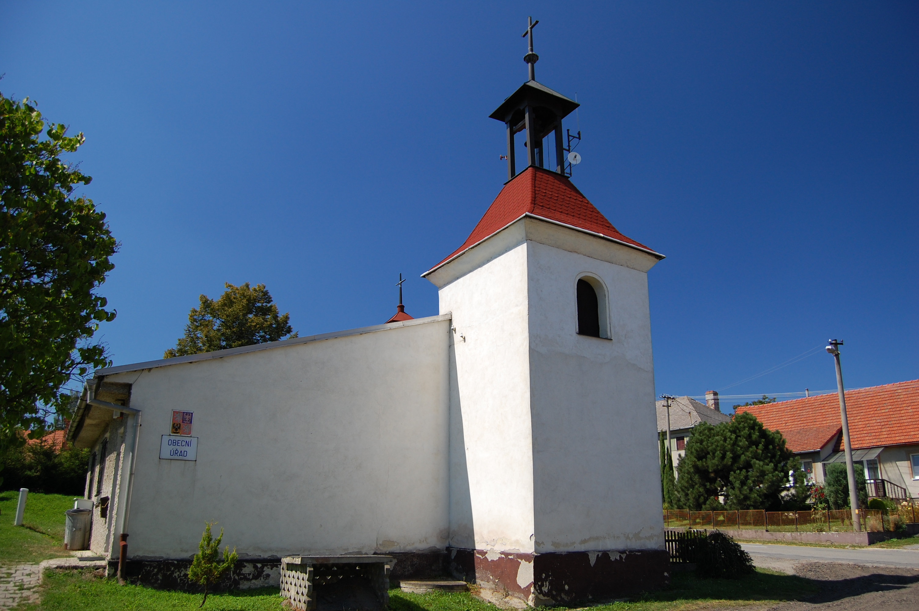 Kaplička a obecní úřad, Dzbel, okres Prostějov